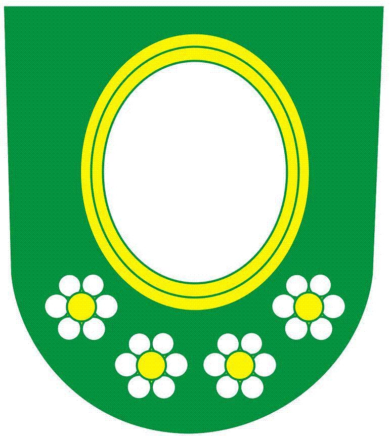 Znak obce Hošťálkovy